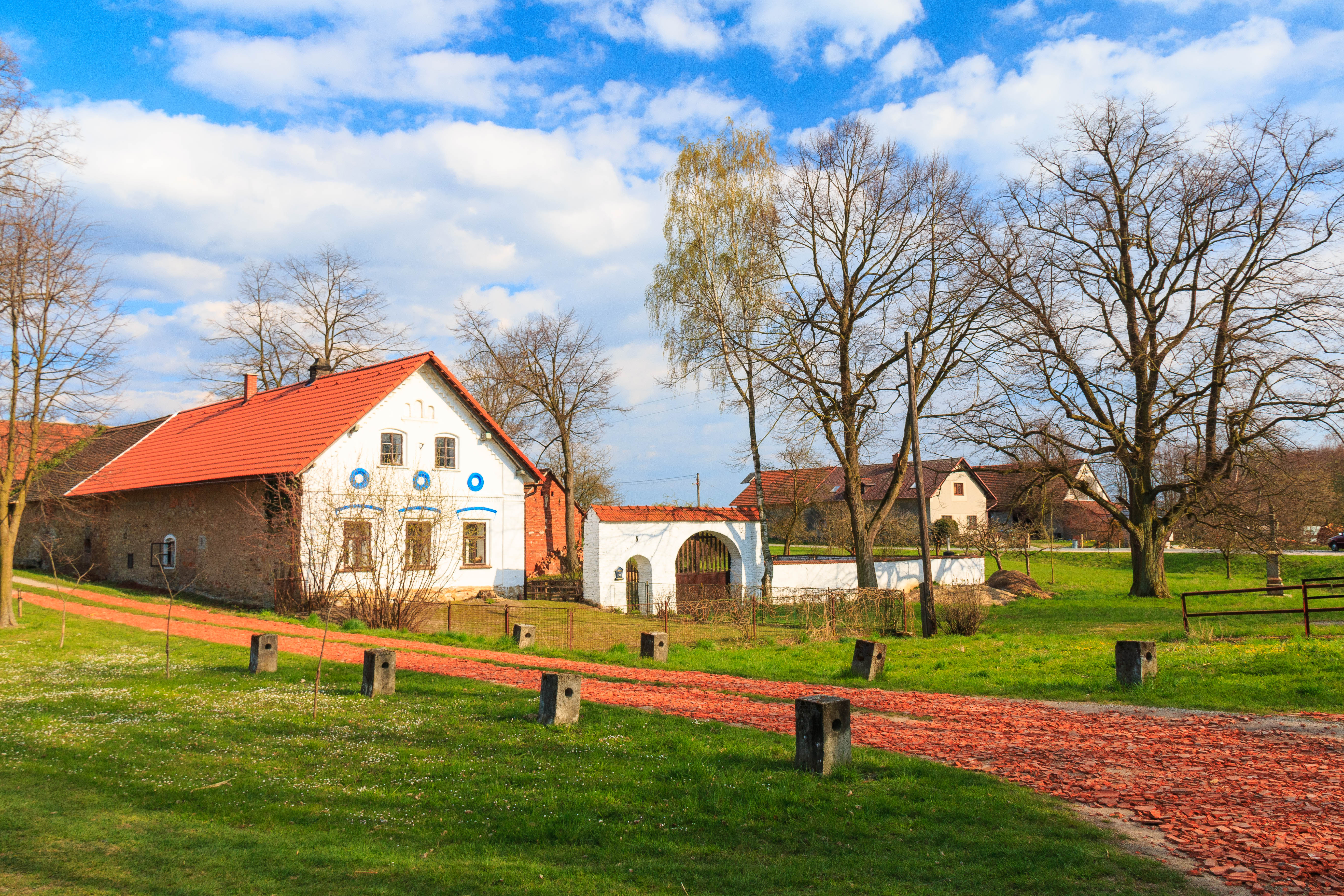 Šereč č 8